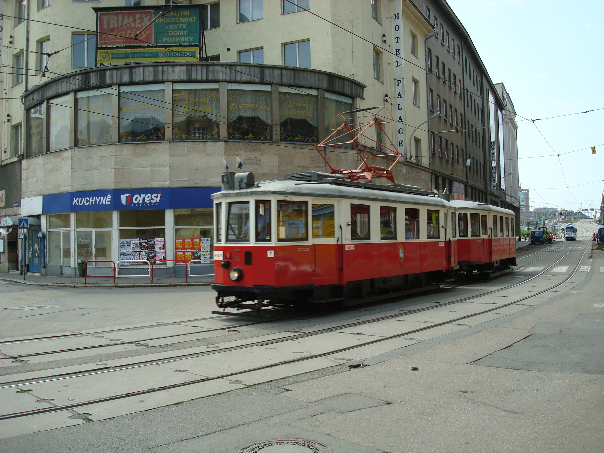 Historická tramvaj ev. č. 94 a vlečný vůz ev. č. 269